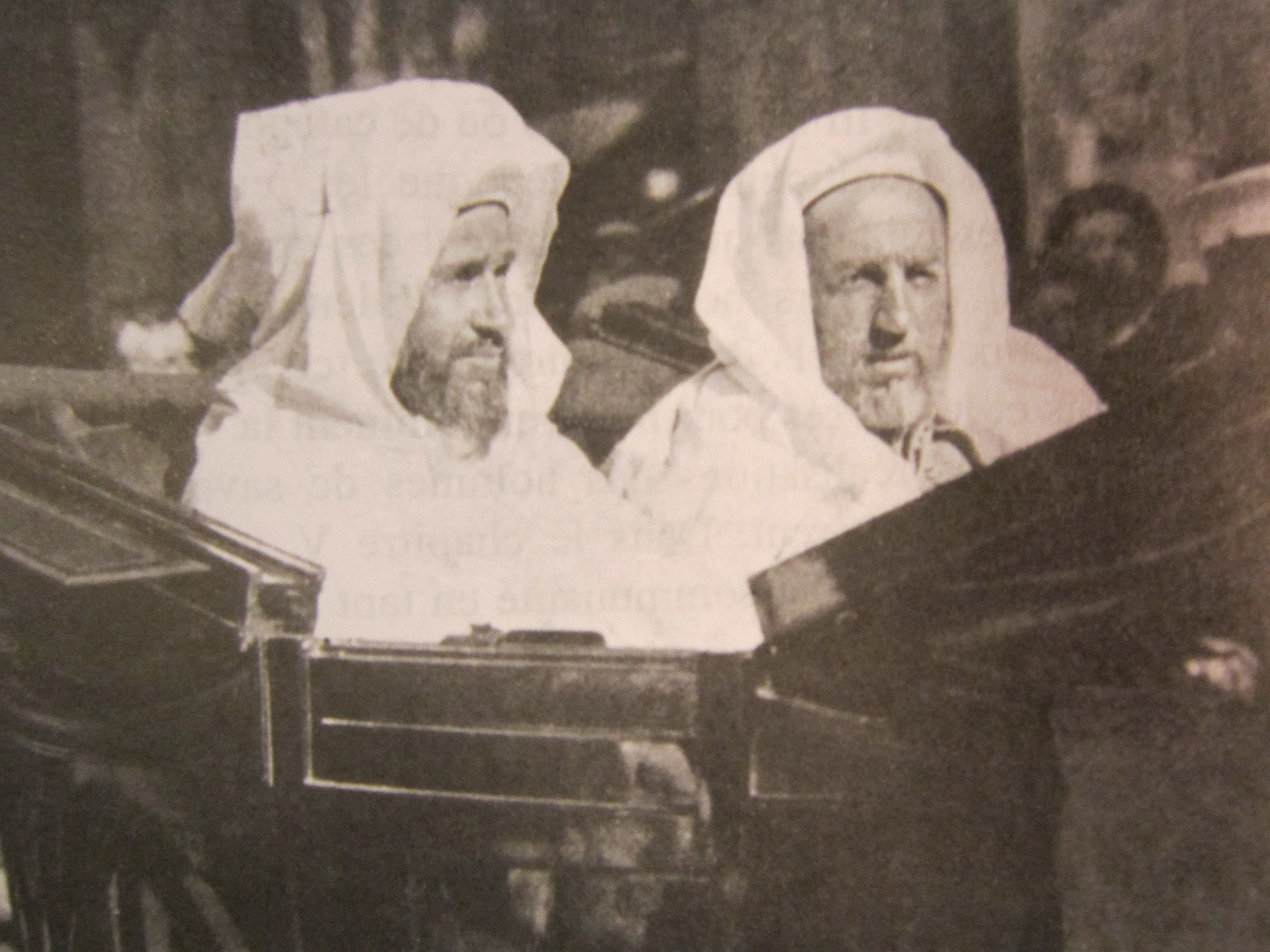 Ambassador Mohamed Ben Abdelhadi Zniber in Madrid